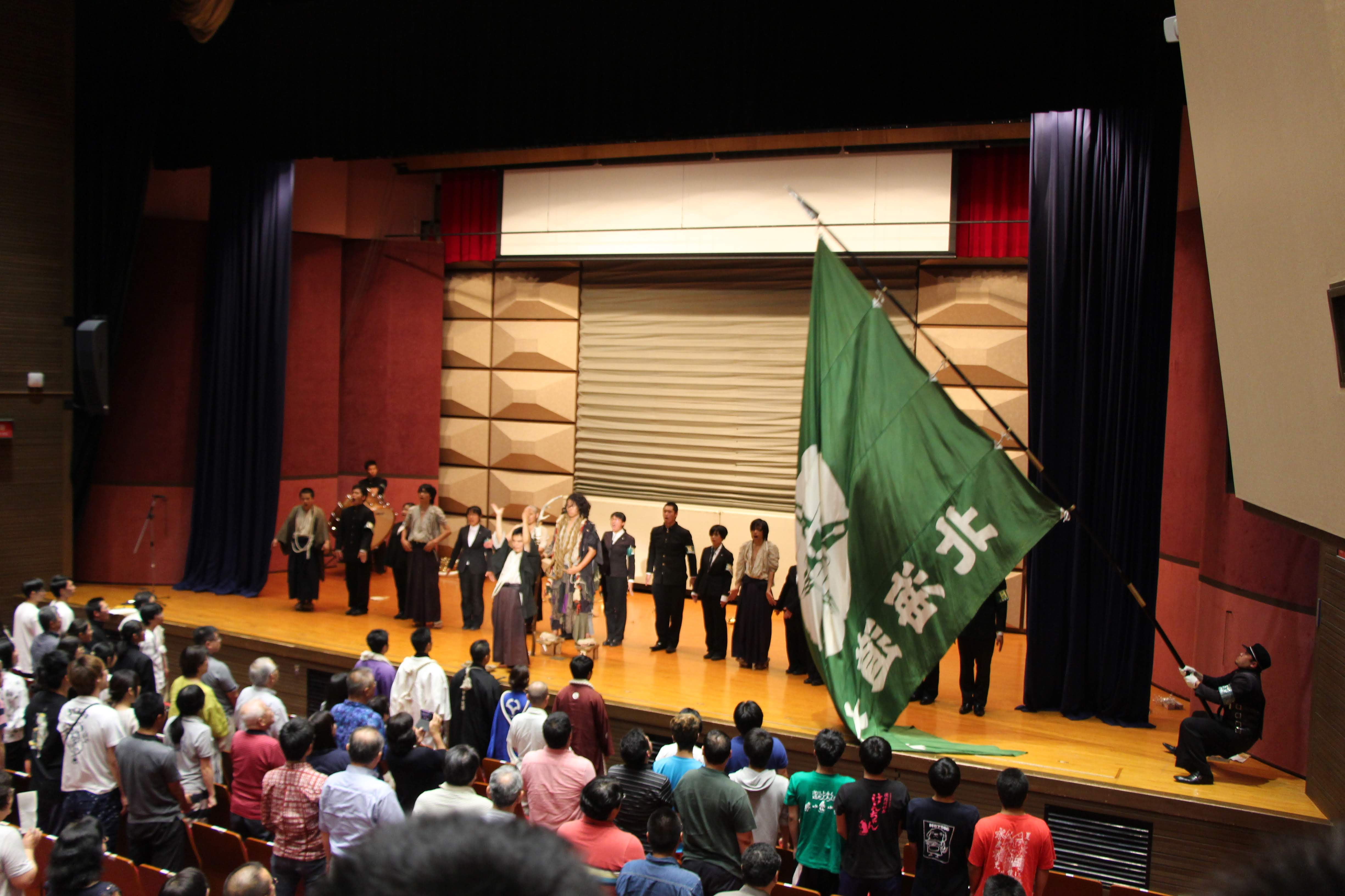 全国七大学総合体育大会の応援団・応援部合同演舞演奏会における北大応援団の演舞、2018年開催、北海道大学主幹。